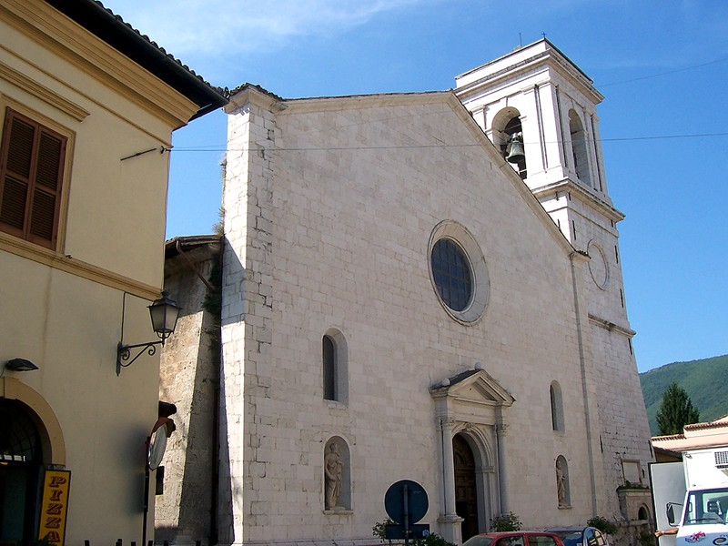 Norcia - Cattedrale